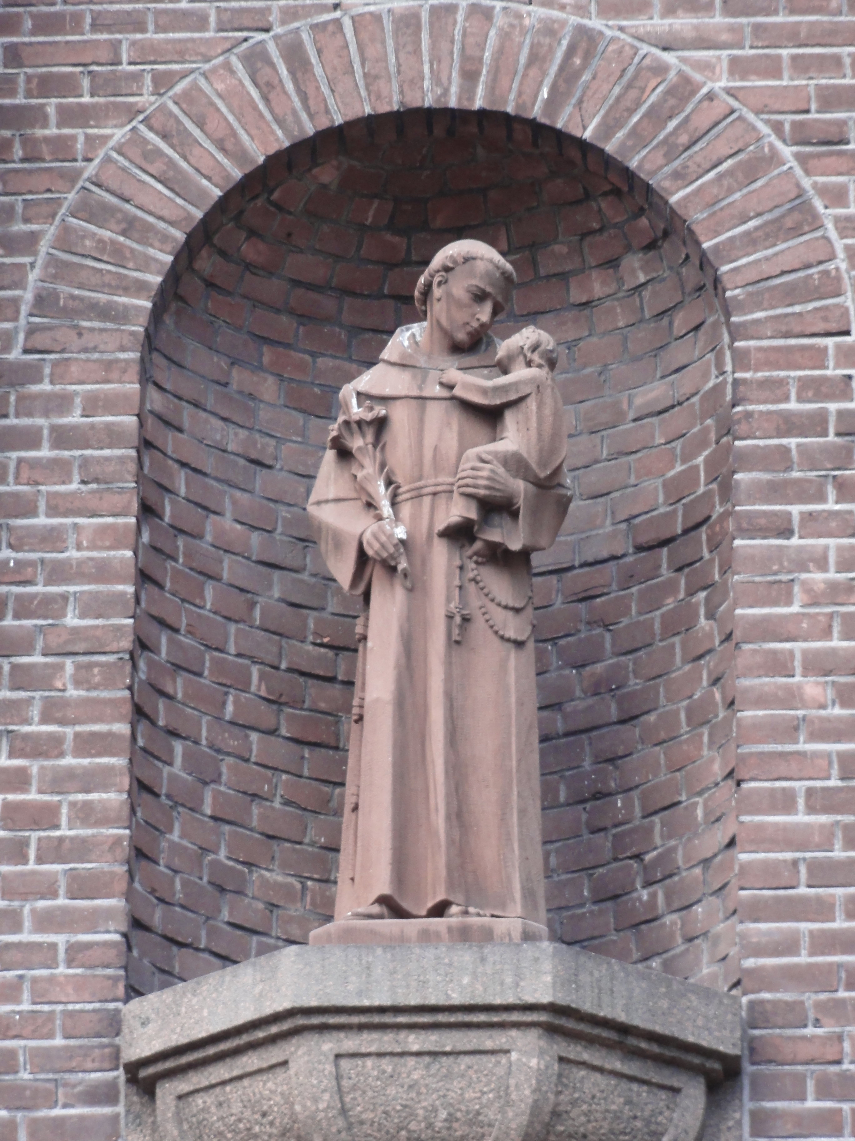 Boekel Huize Padua